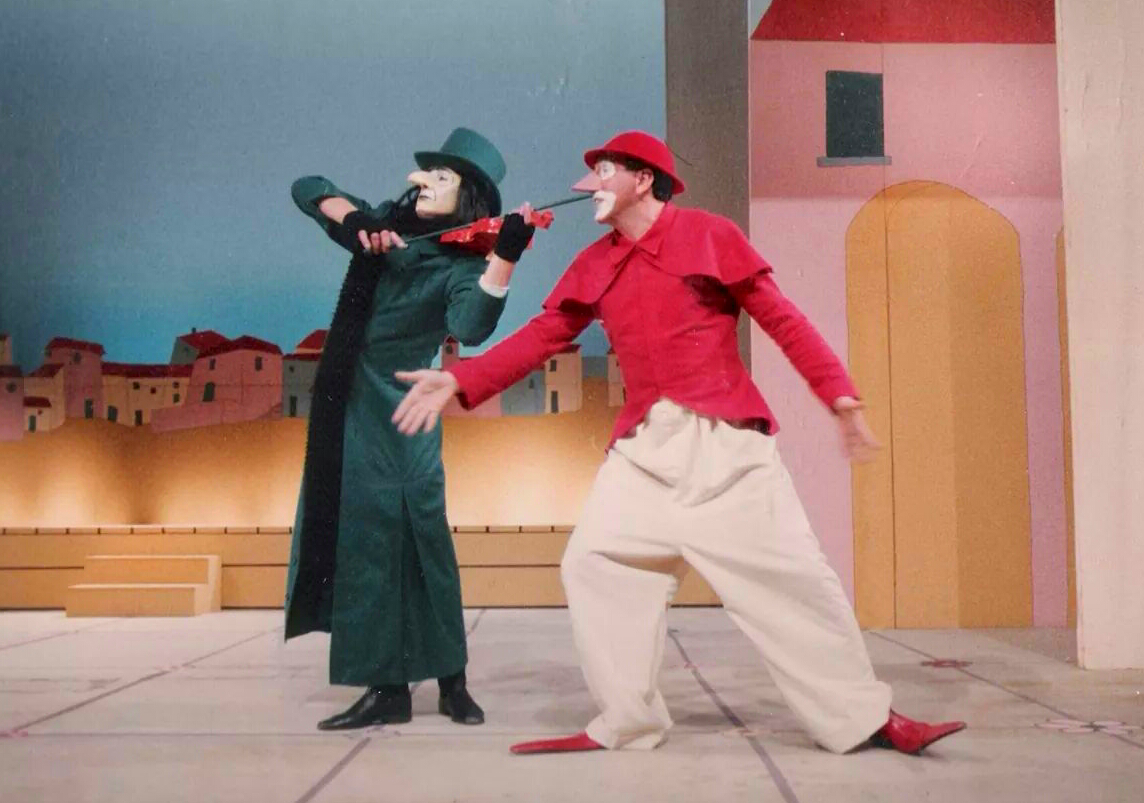 בונוונטורה